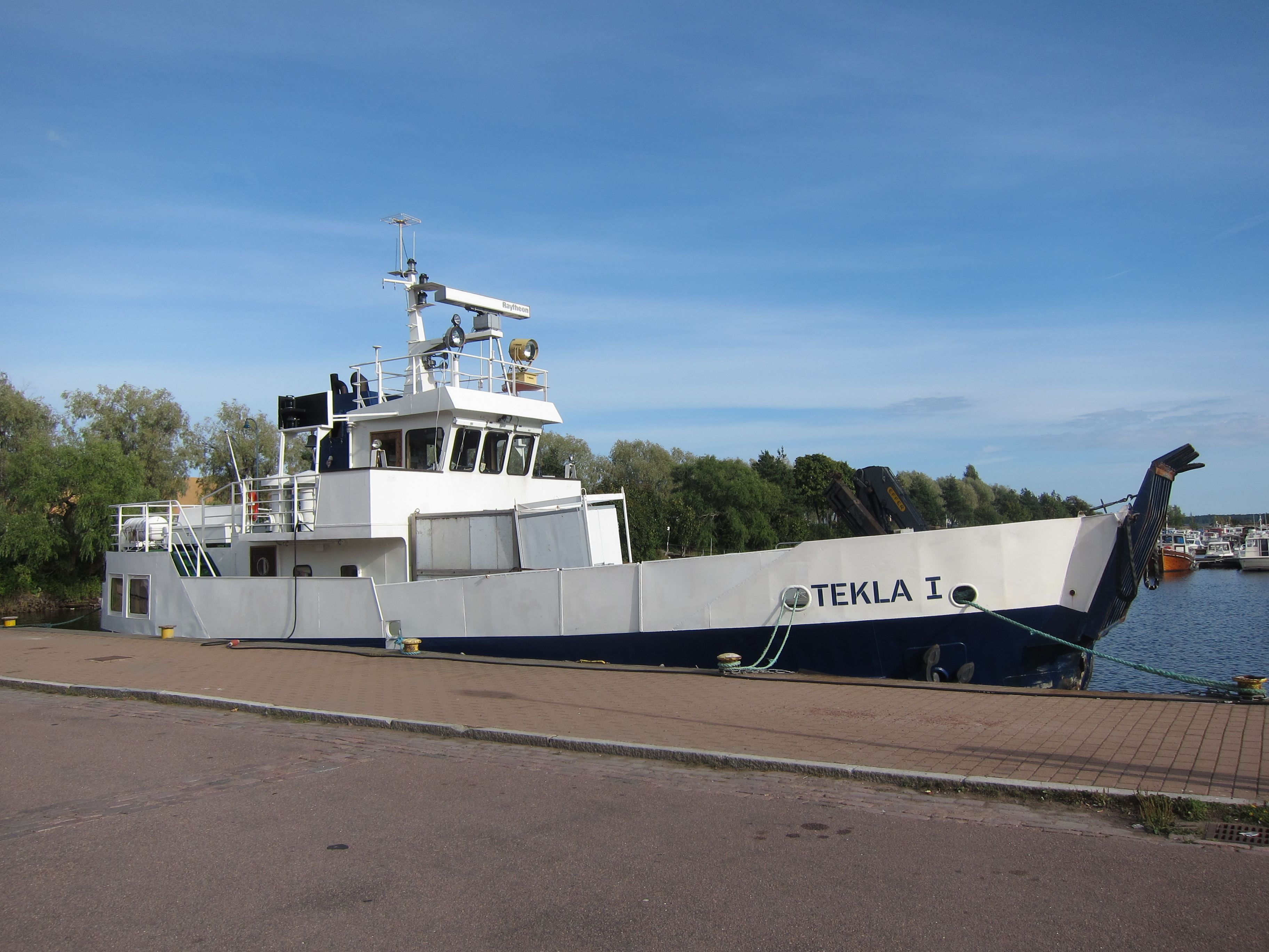 Yhteysalus M/S Tekla I Kotkan Sapokan satamassa.